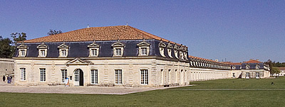 Corderie Royale de Rochefort - Charente-Maritime Photo issue de ma banque d'images personnelle Pep.per